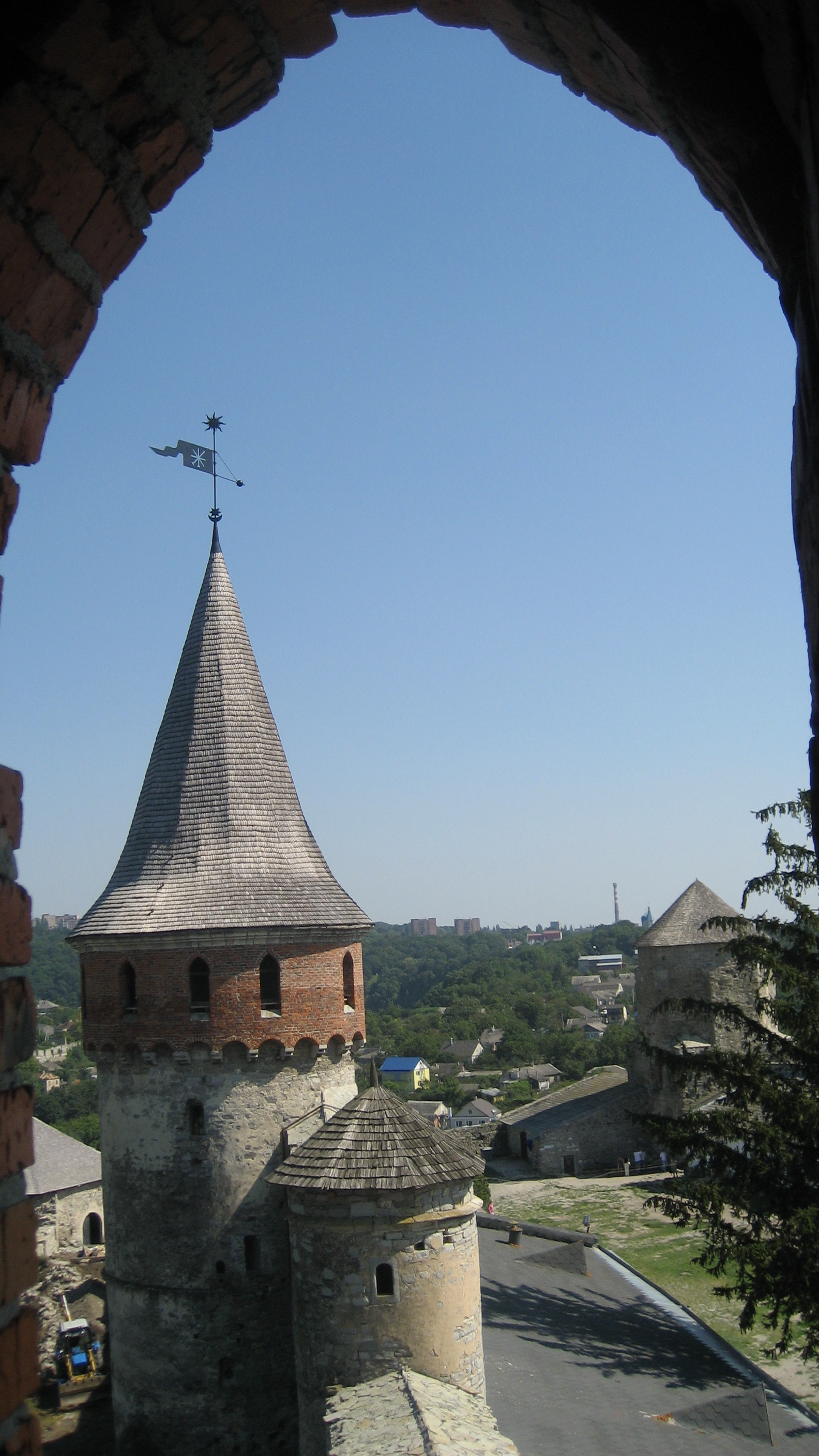 Лянцкоронська Башта з "Коменданською" (мала)